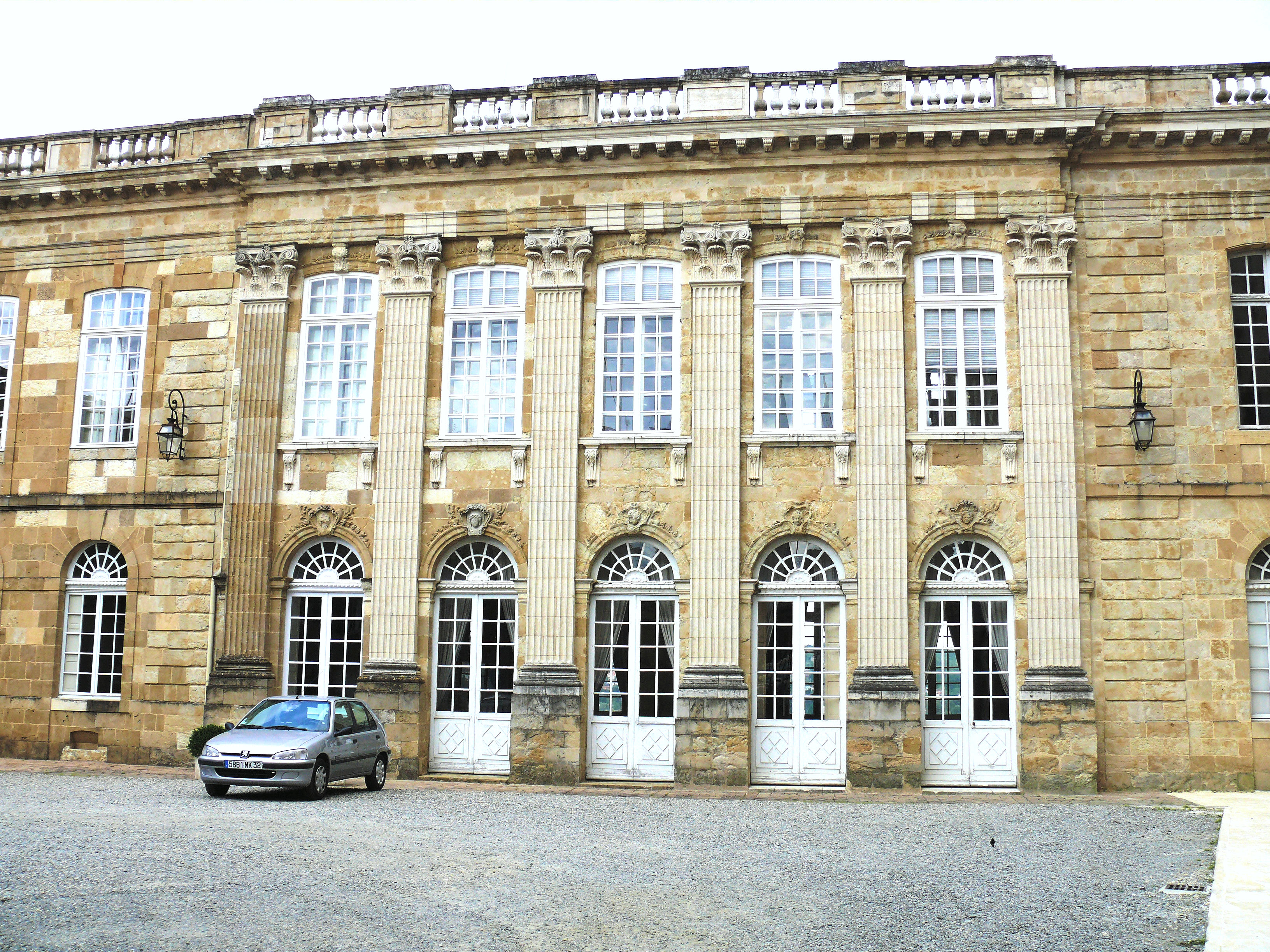 Auch - Prefecture du Gers, ancien Palais archiépiscopal